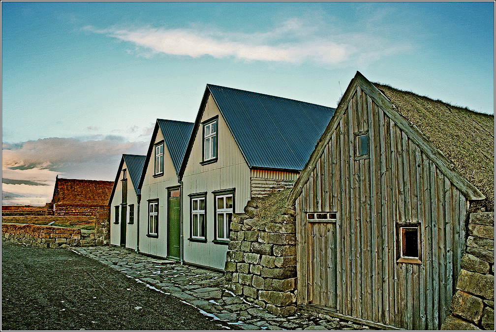 'n Plaashuis in die opelugmuseum Árbæjarsafn.